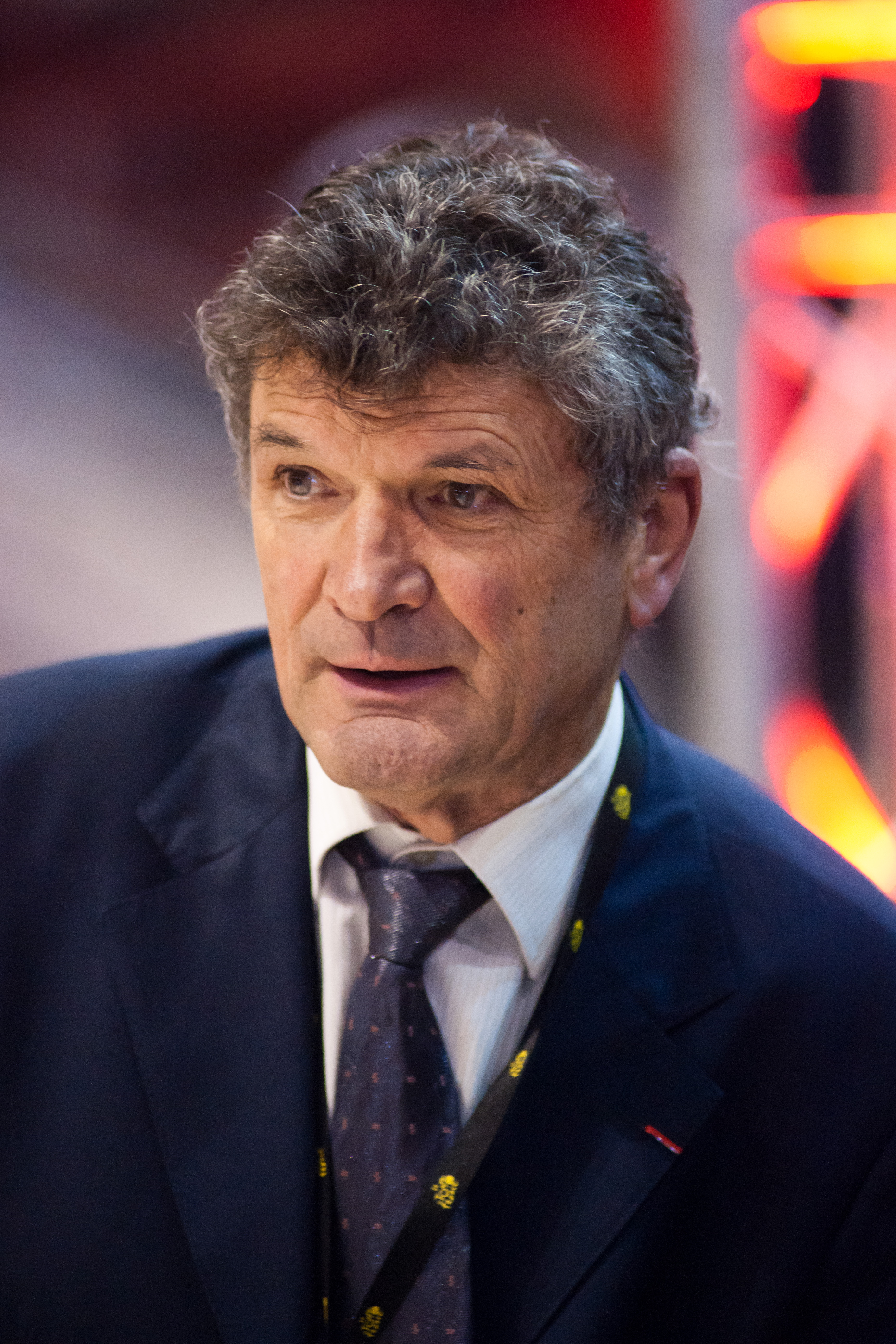 Bernard Thévenet aux six jours de Grenoble